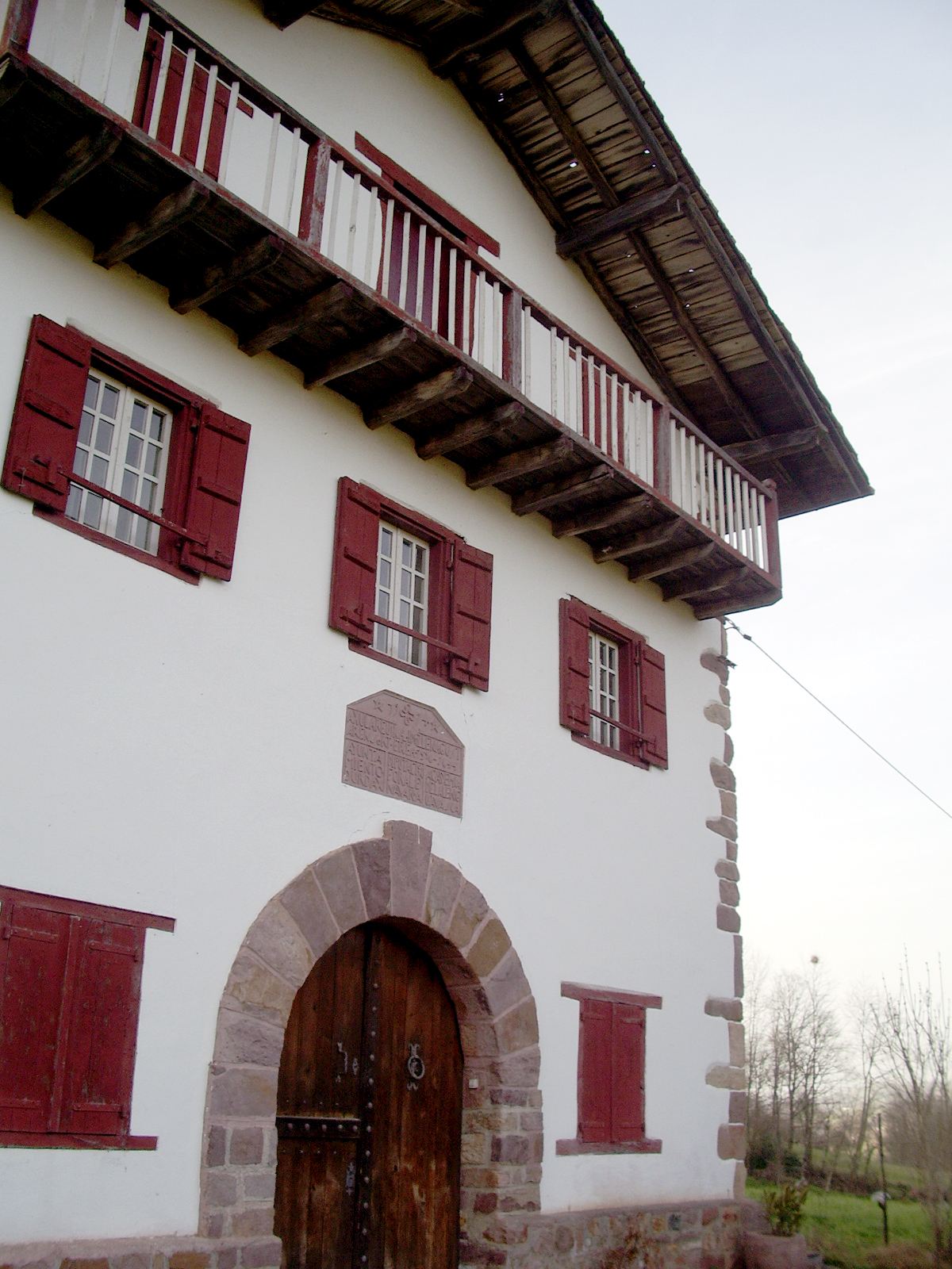 Axular etxea, Pedro Agerre Axular-en jaiolekua